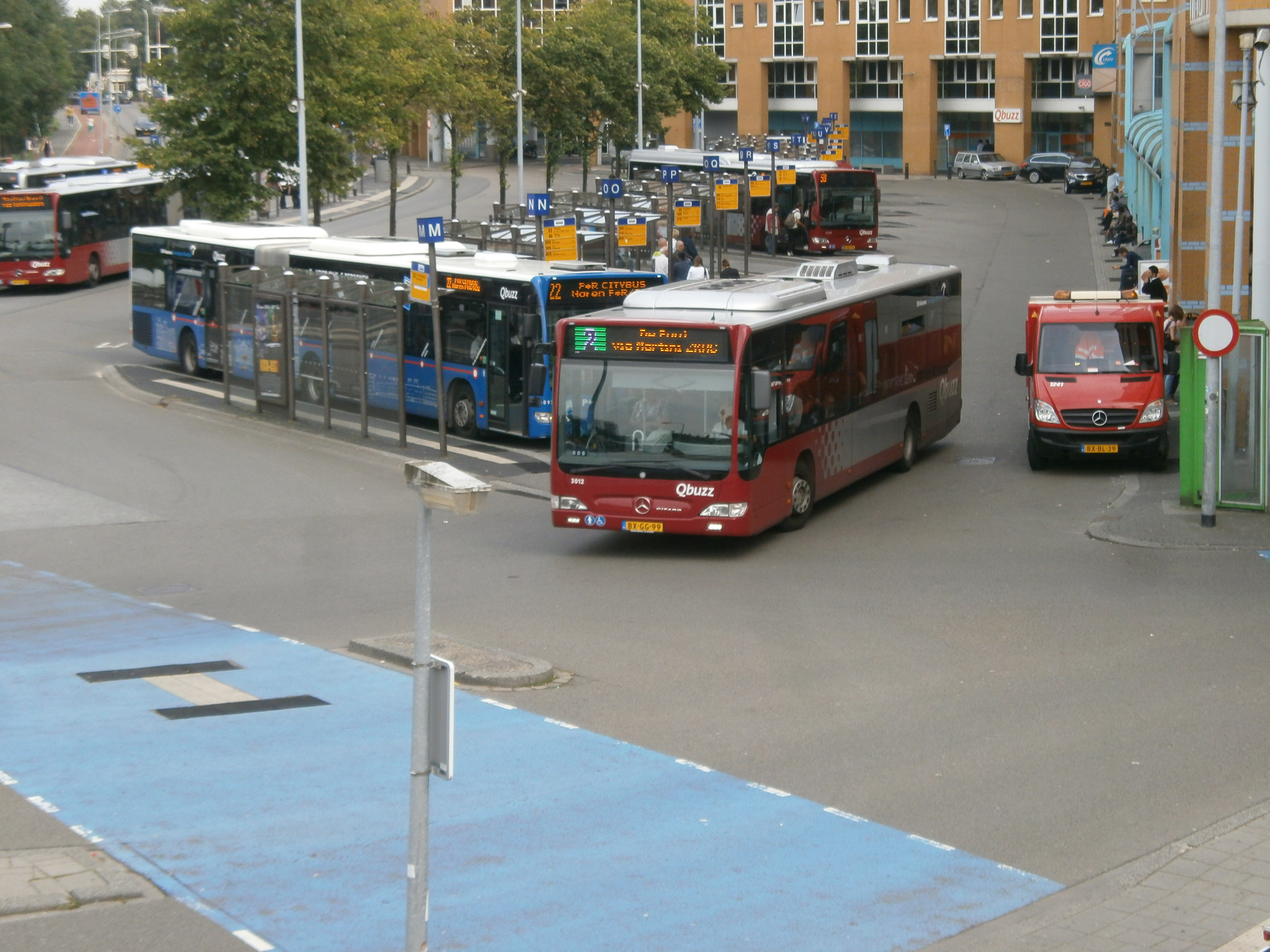 Een bus op lijn 2 richting De Punt